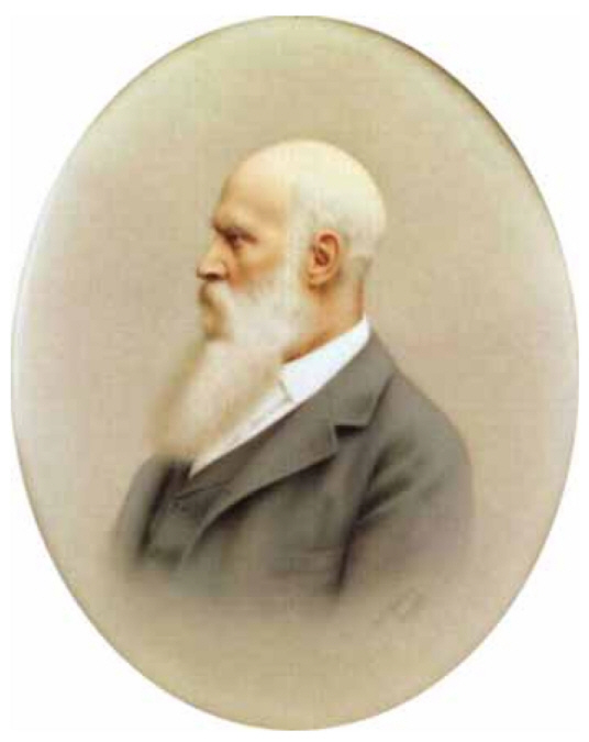 Bildnis Herzog Georg II. von Sachsen­-Meiningen, um 1900, Porzellanmalerei, oval: 28,5 x 23,5 cm Theaterwissenschaftliche Sammlung der Universität zu Köln, Schloss Wahn, Inv.Nr. 37013 (Sammlung Niessen)